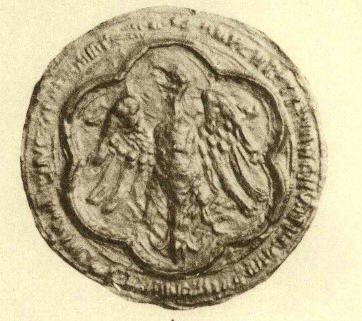 This is a scan of the historical document: Title: Die Siegel der deutschen Kaiser und Könige v. 2 (1347 - 1493)